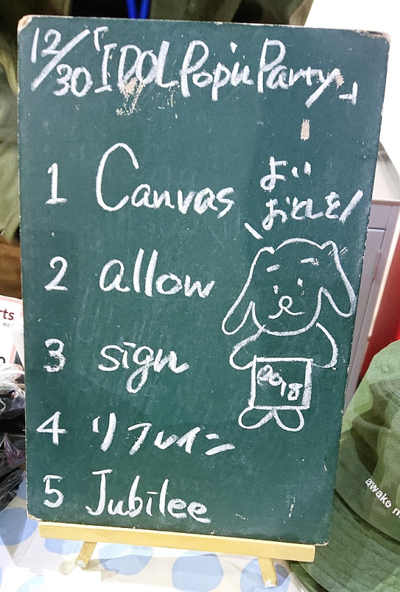 amiinAセトリボード(20181230(1))